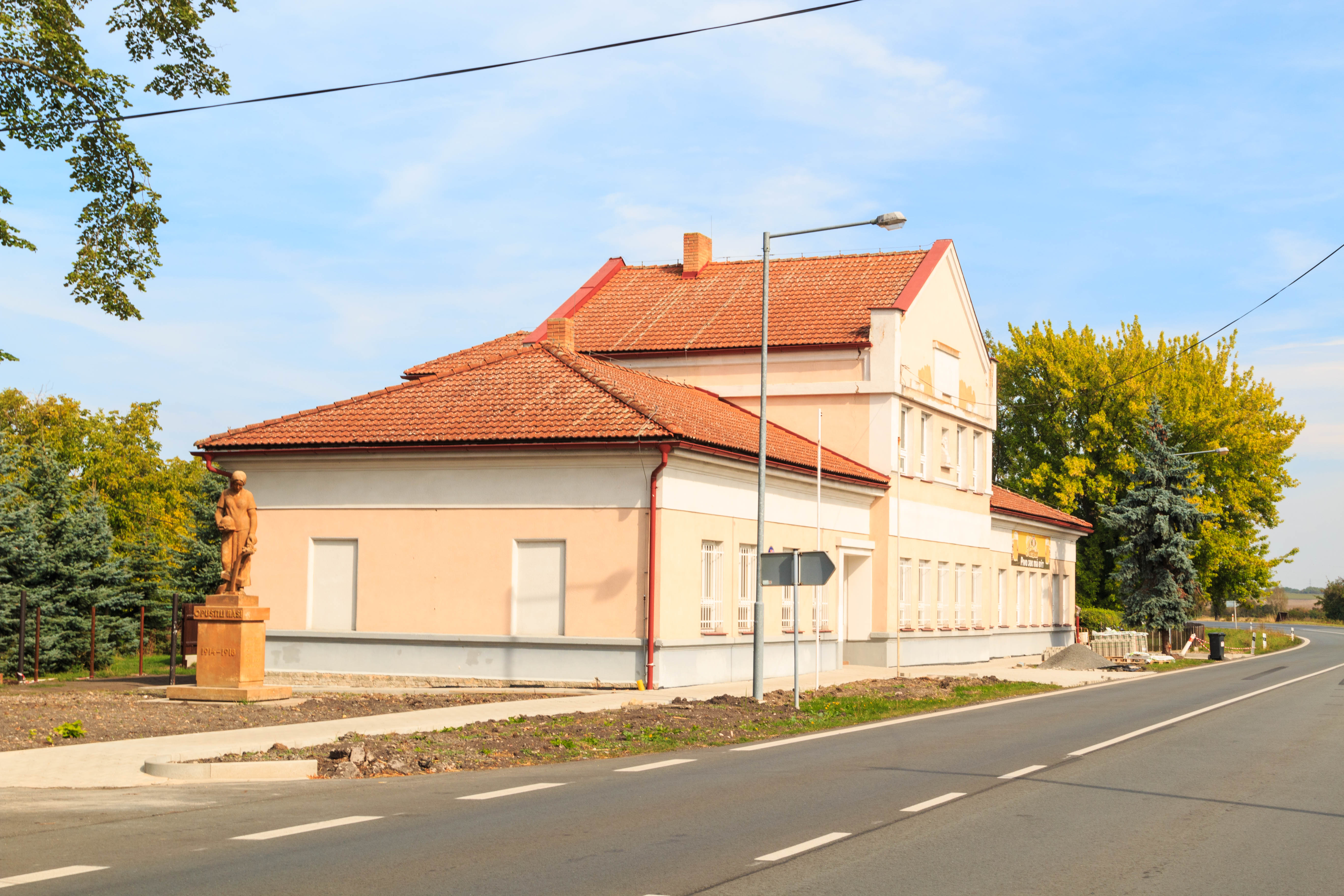 Okřínek obecní úřad